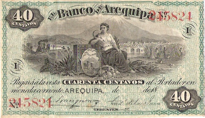 Billete